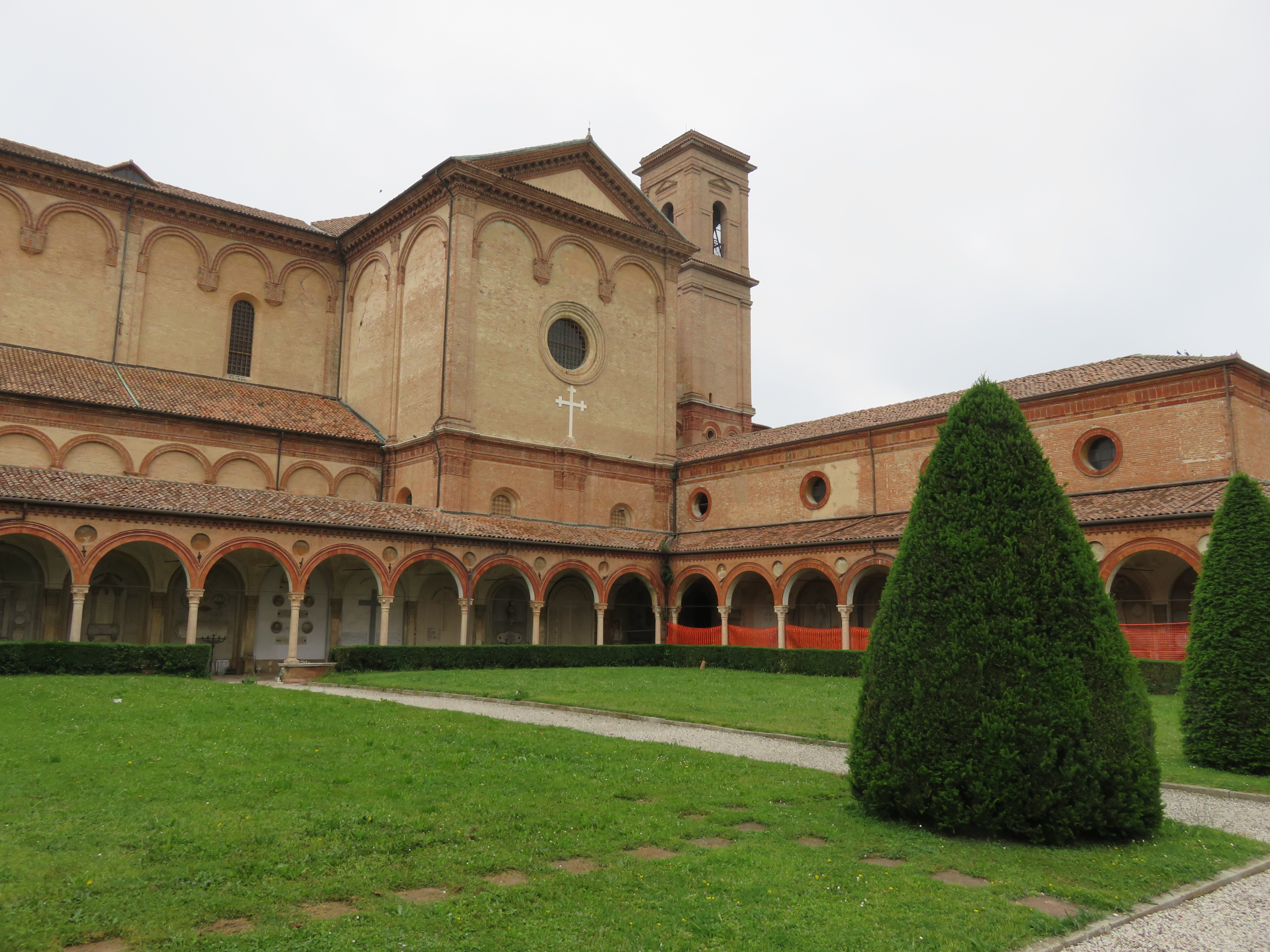 Cimitero monumentale della Certosa di Ferrara, primo Gran Claustro